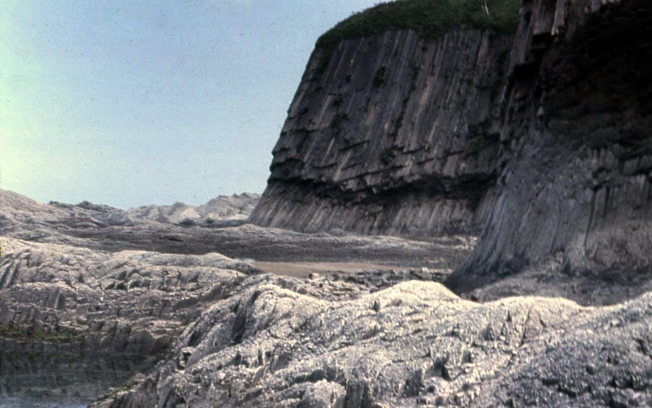 Остров Кунашир, Столбчатый мыс.